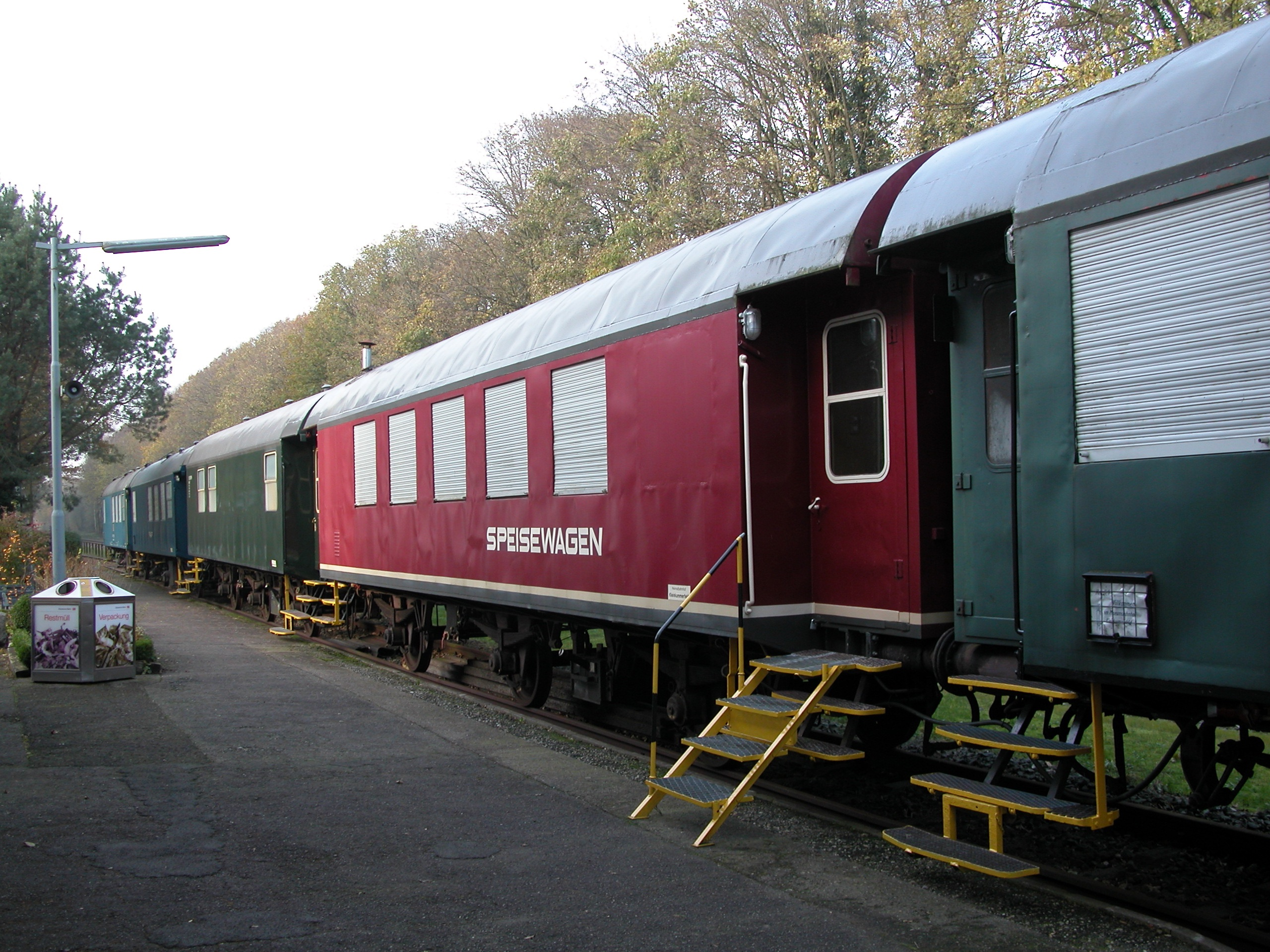 Bahnhof Kleinkummerfeld Bahnsteigseite